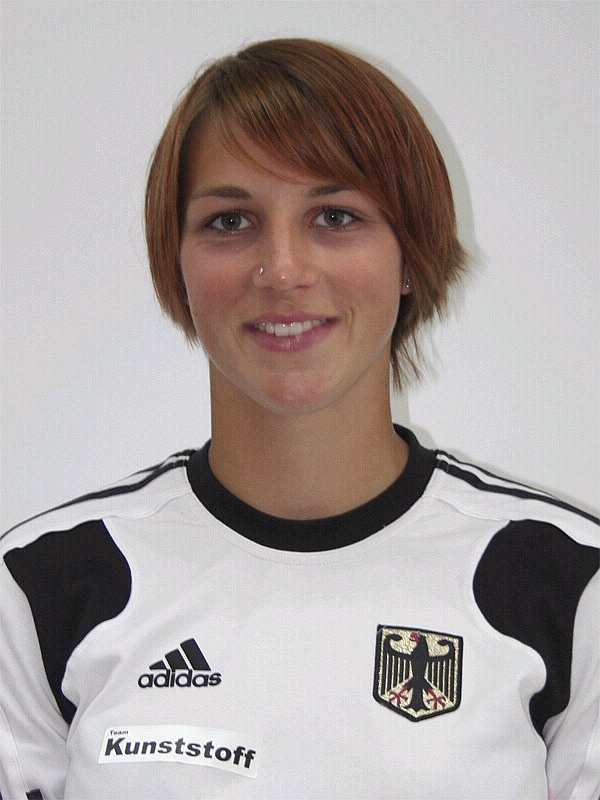 Weltmeisterin im Zweier-Kajak 2011 über 1.000m